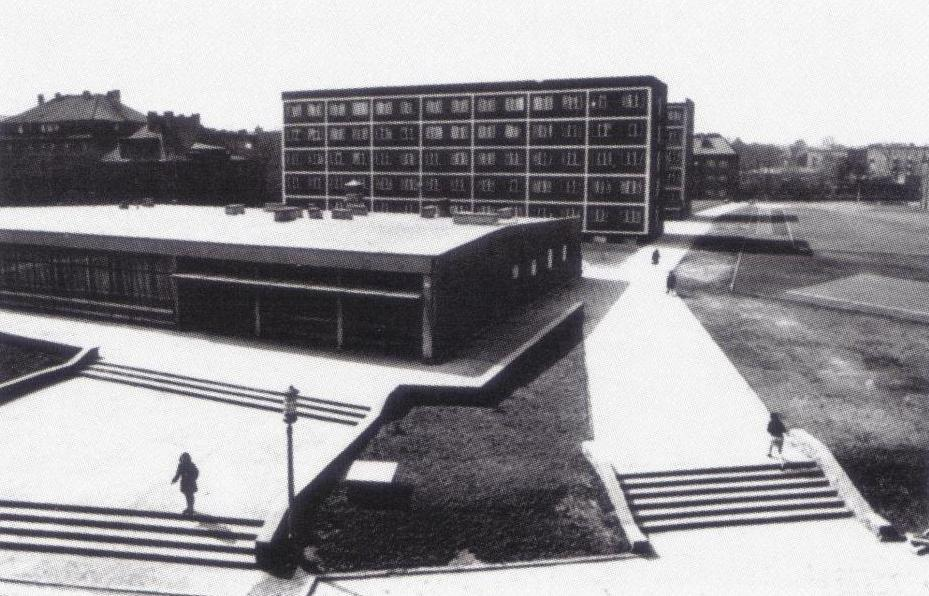 Klub studencki "Kocioł" w miasteczku akademickim WSP w Opolu